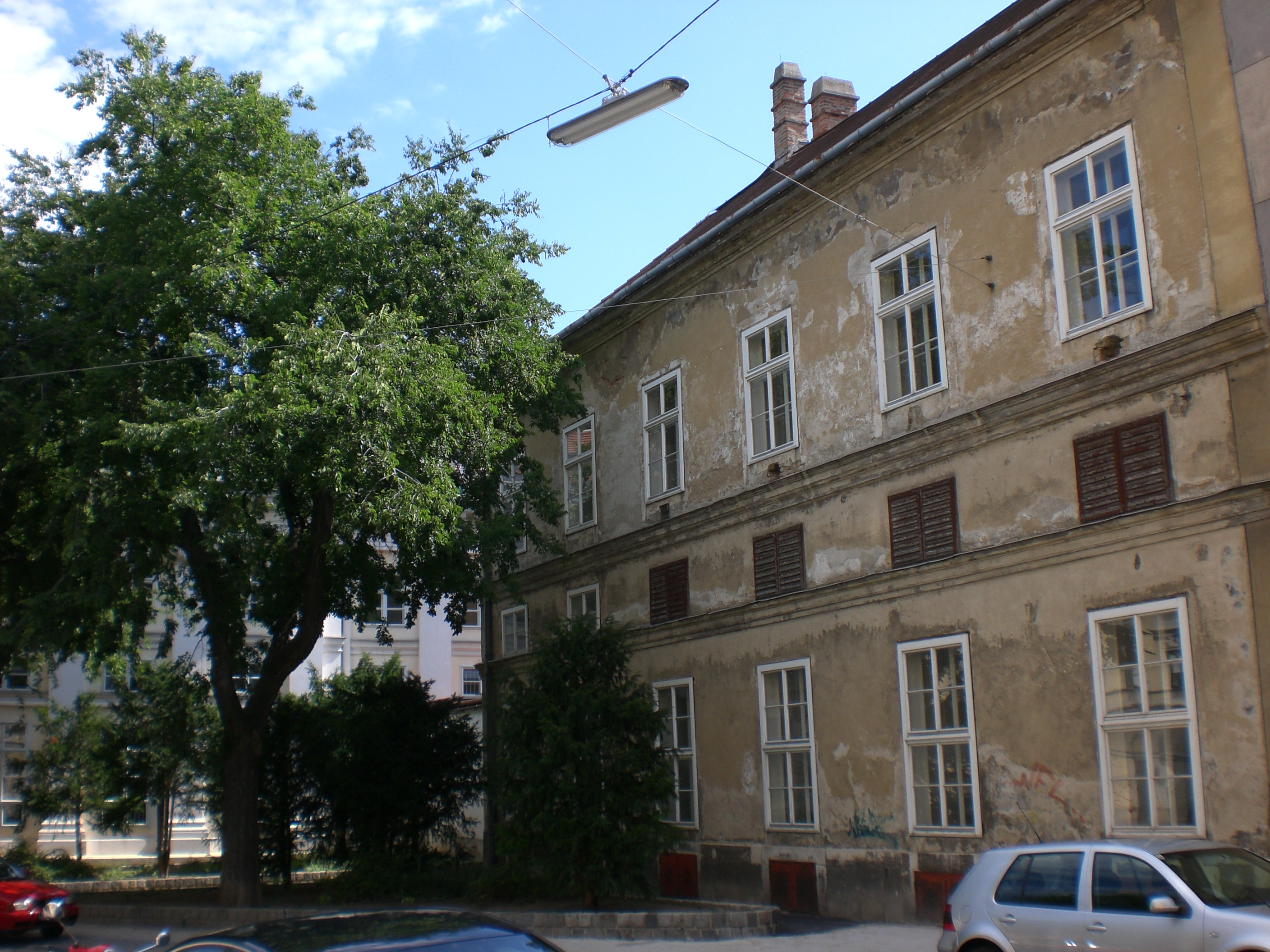 Ehemaliges Wirtschaftsgebäude des Palais Rasumofsky